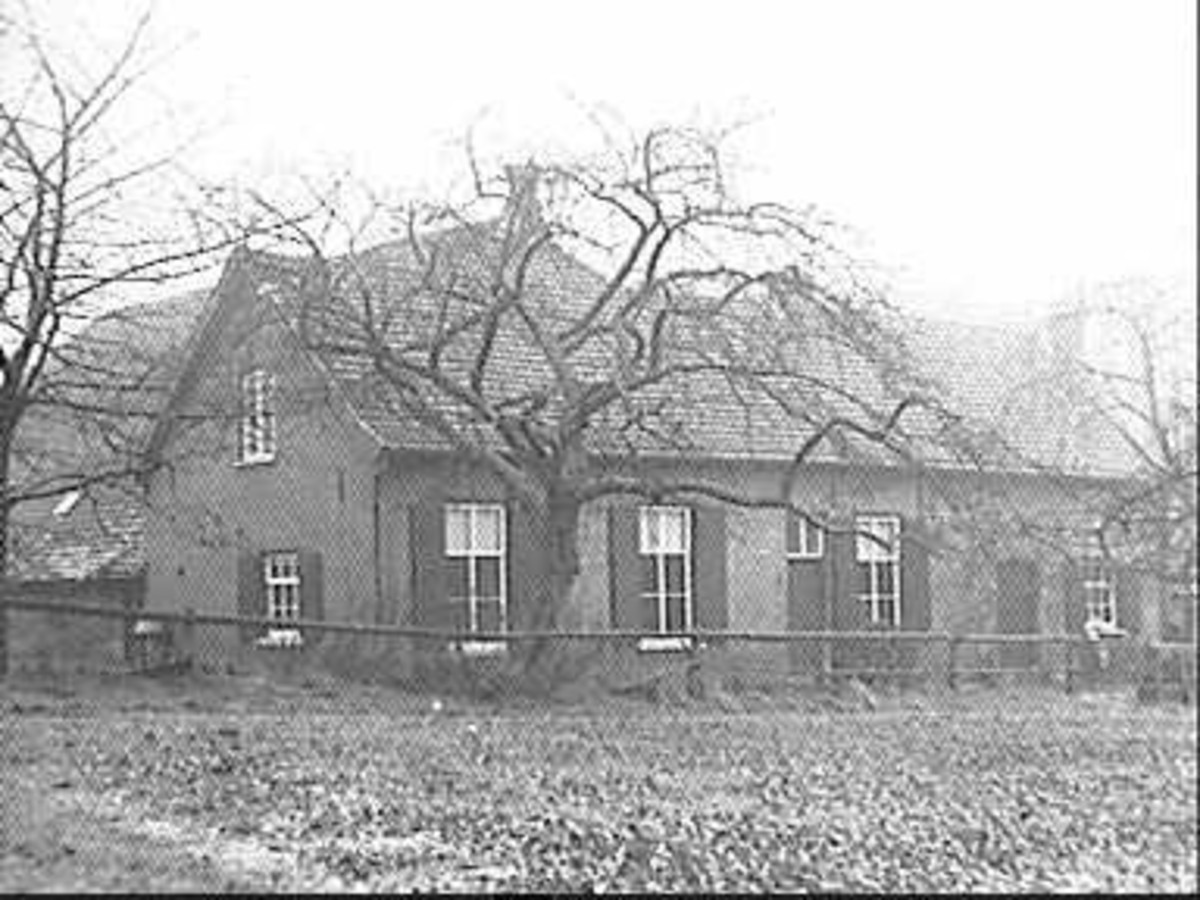 Herikhuizen: zij- en voorgevel (opmerking: Deze afbeelding hebben wij helaas alleen in deze lage resolutie.)